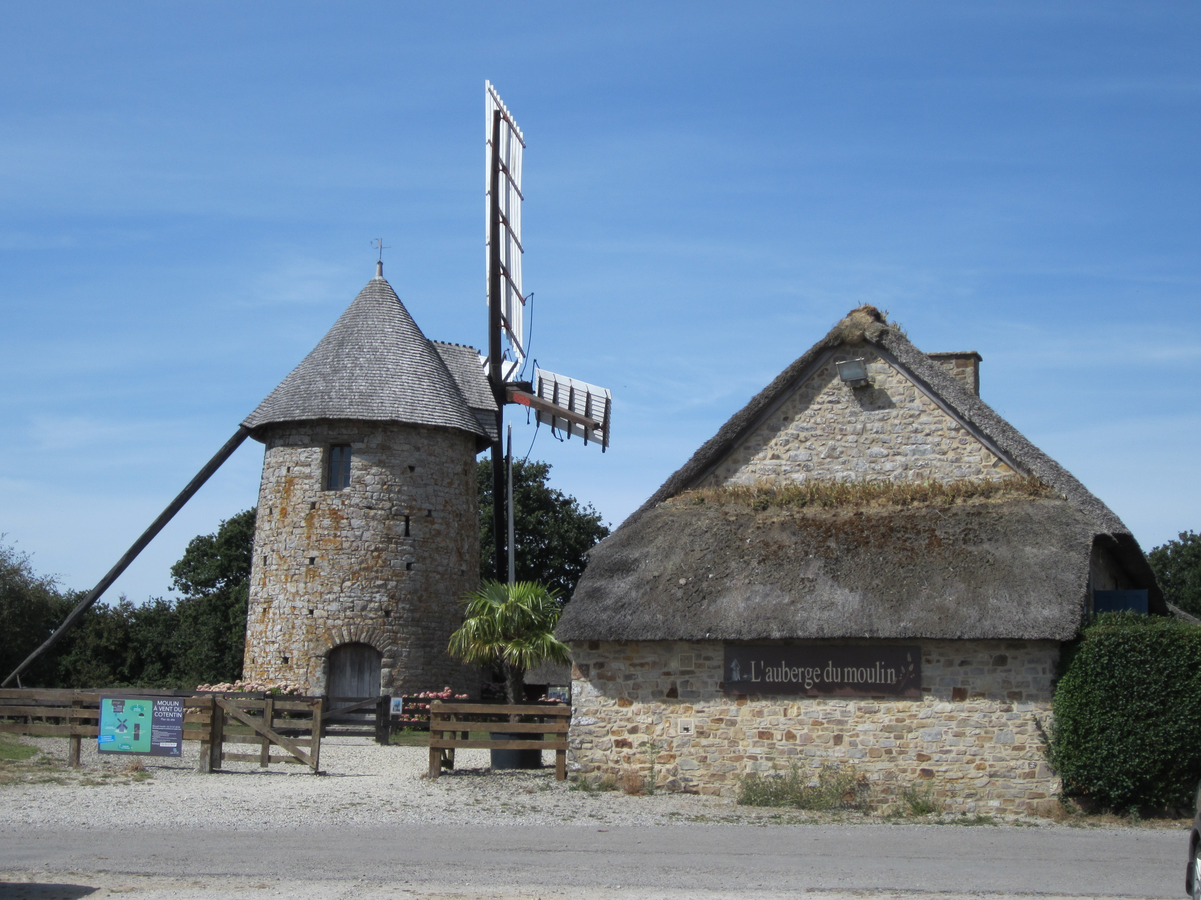 Fierville-les-Mines, Manche